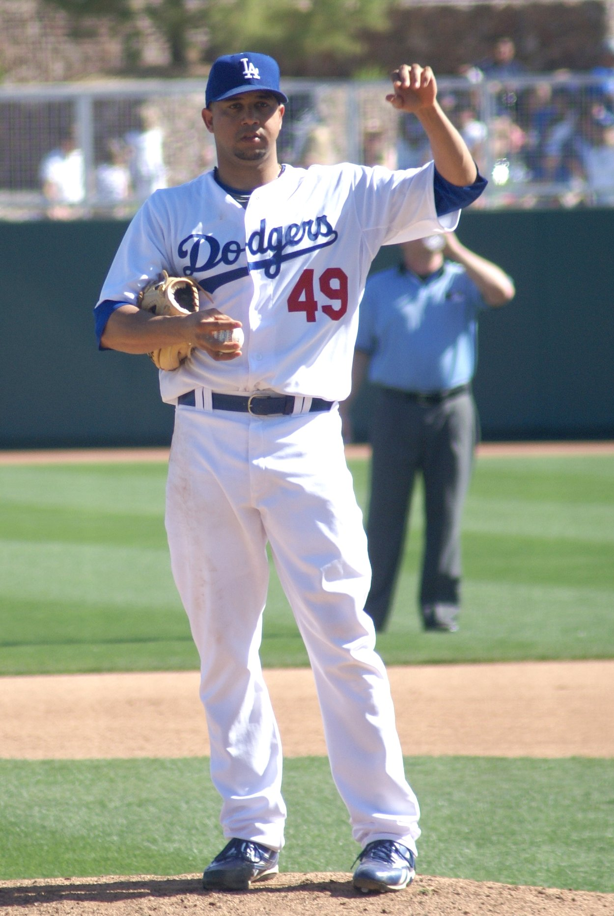 Claudio Vargas